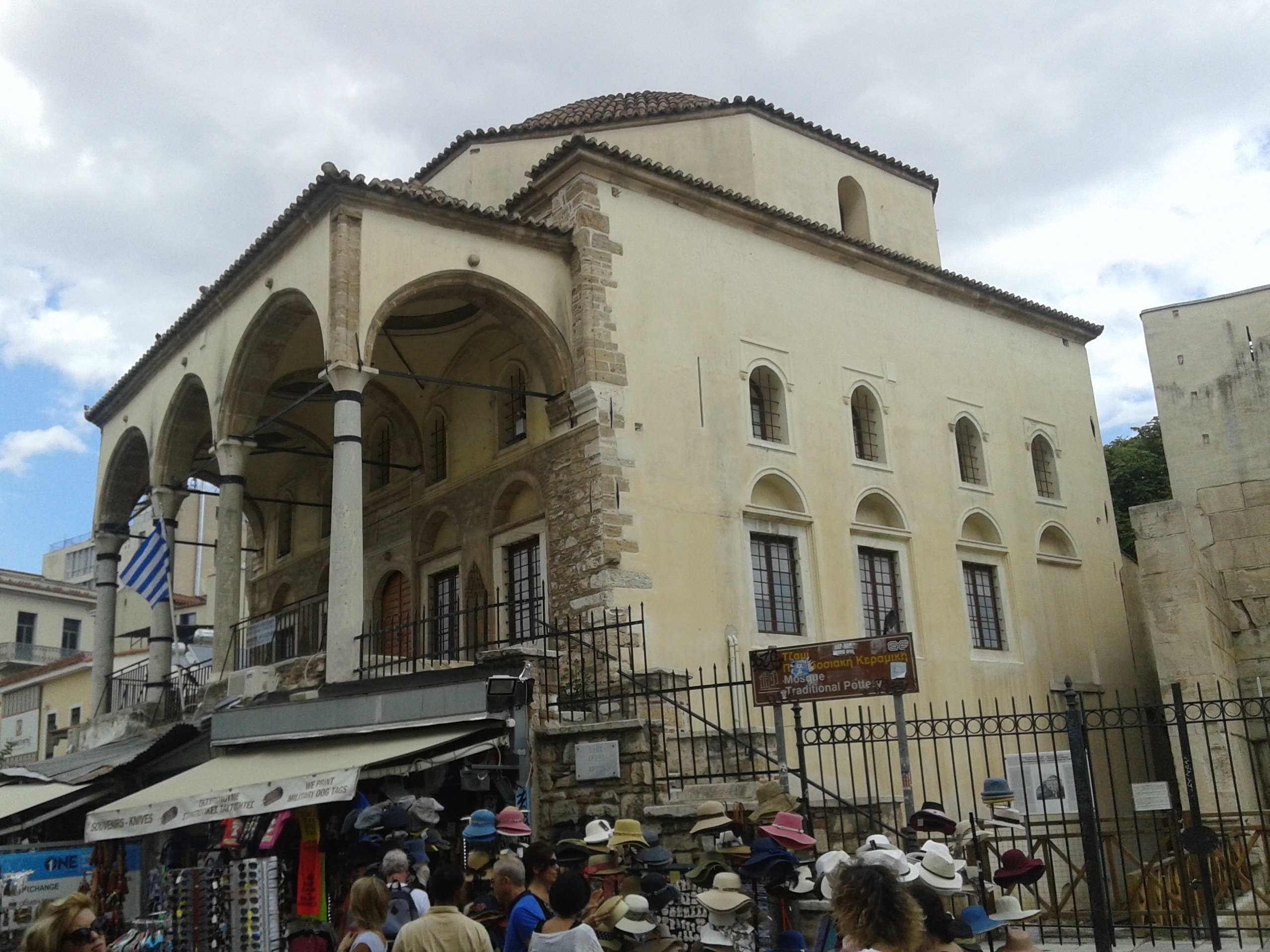 Τζαμί Τζισταράκη«Τζαμί Τζισταράκη»